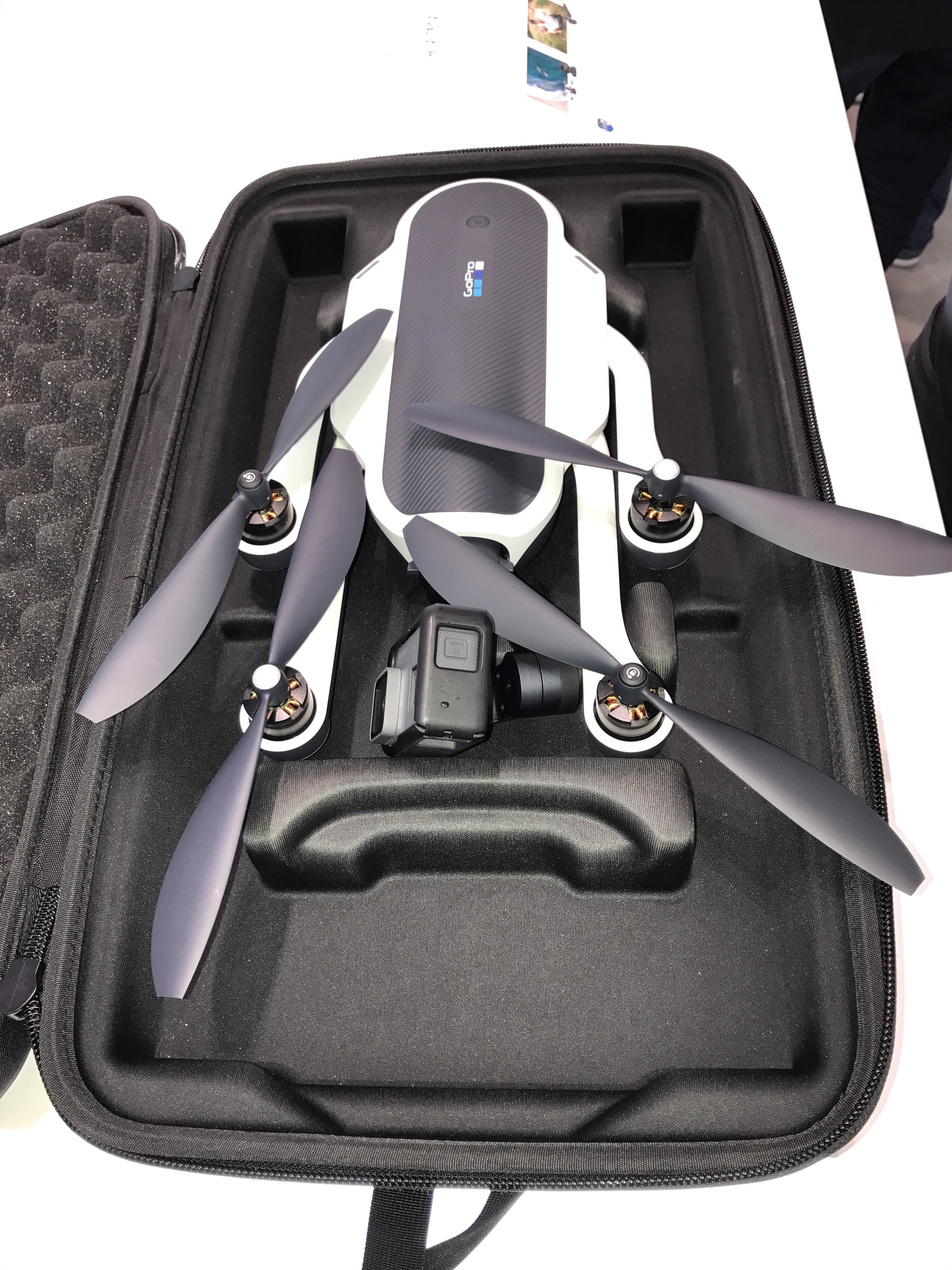 Gopro Karma Rucksack backpack